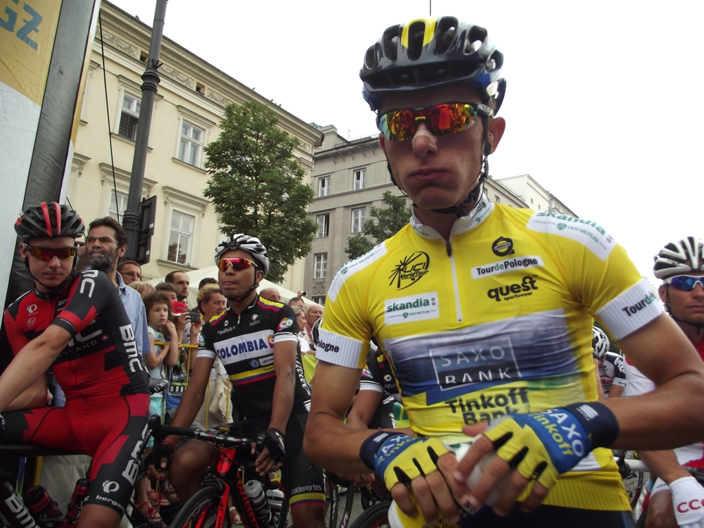 Zdjęcie zrobione podczas III etapu 70. jubileuszowego Tour de Pologne w Krakowie.